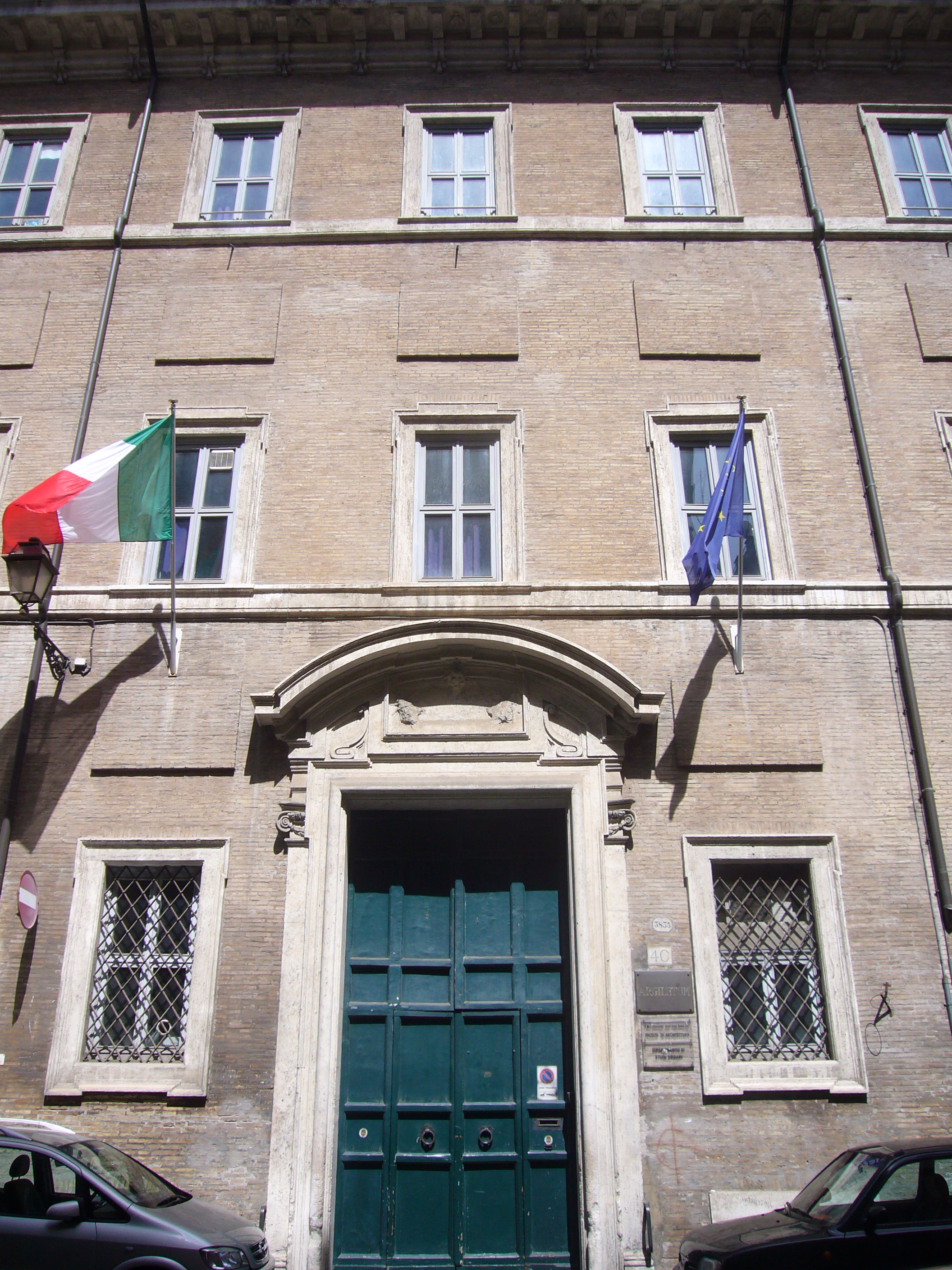 Roma, Collegio dei Neofiti a Madonna dei Monti. Fatto costruire nel 1637 dal card. Antonio Marcello Barberini, ospitò fino al 1713 un seminario per convertiti. E' attualmente sede, col nome di Argiletum, della Facoltà di Architettura dell'Università Roma Tre.